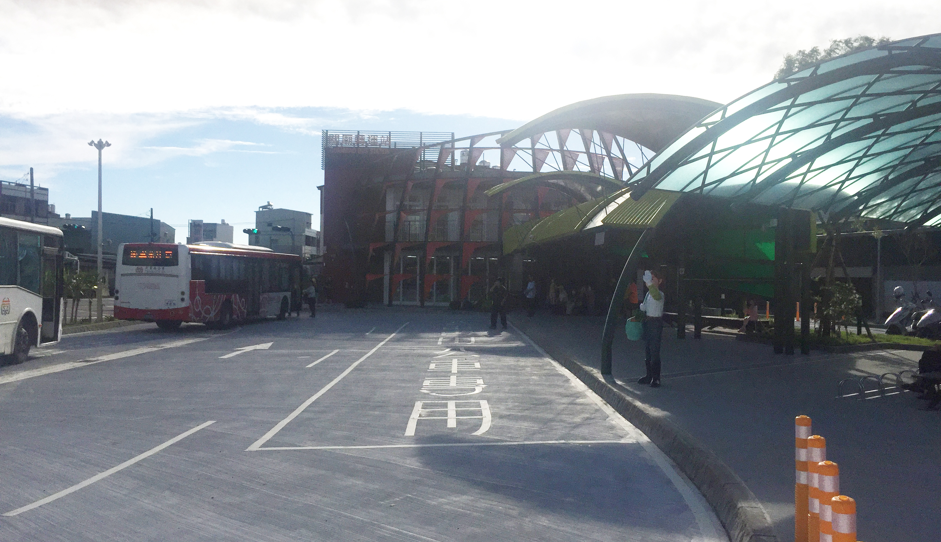 中文（台灣）: 大台南公車關廟轉運站